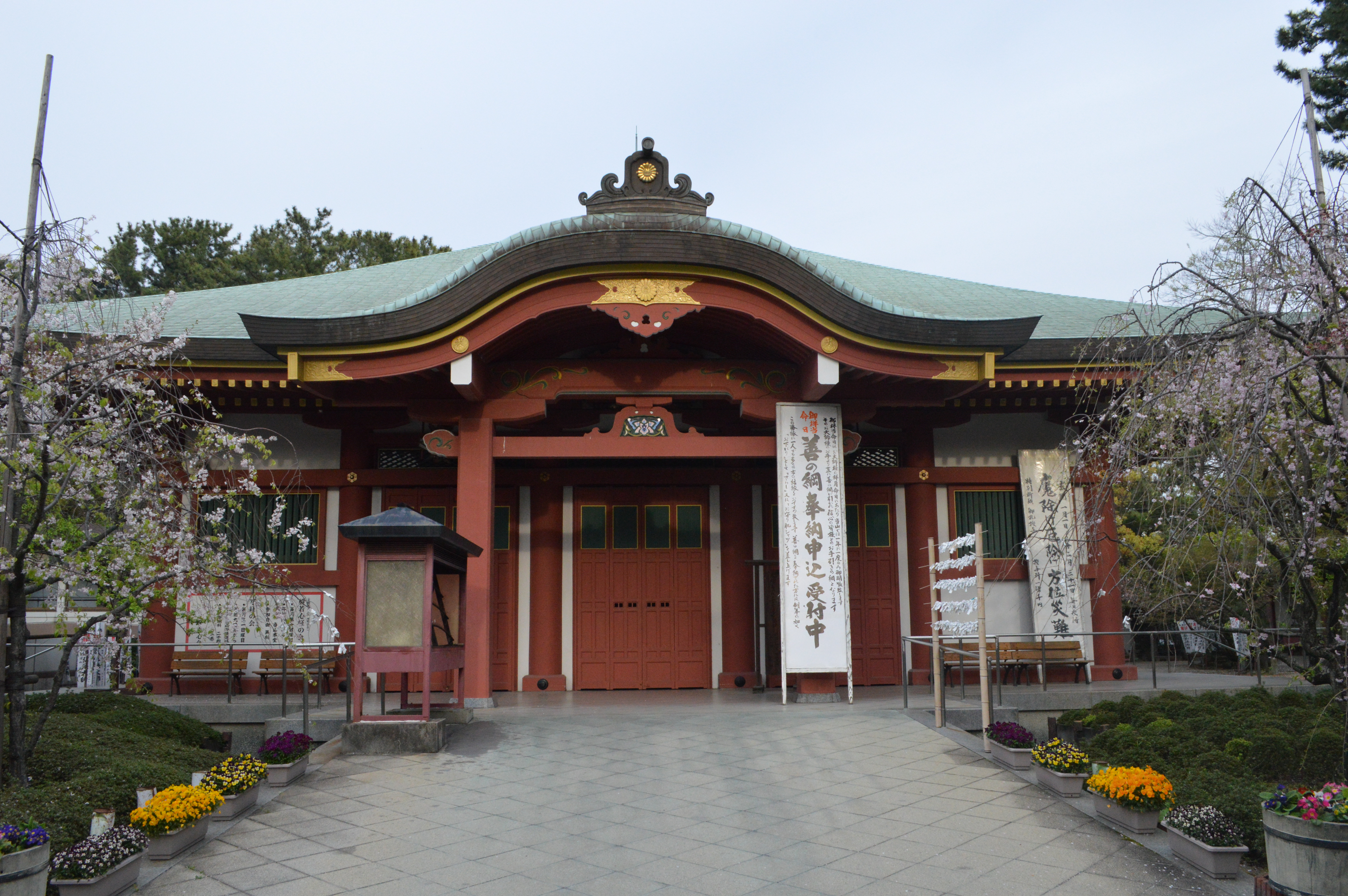 愛知県知立市 遍照院 本堂